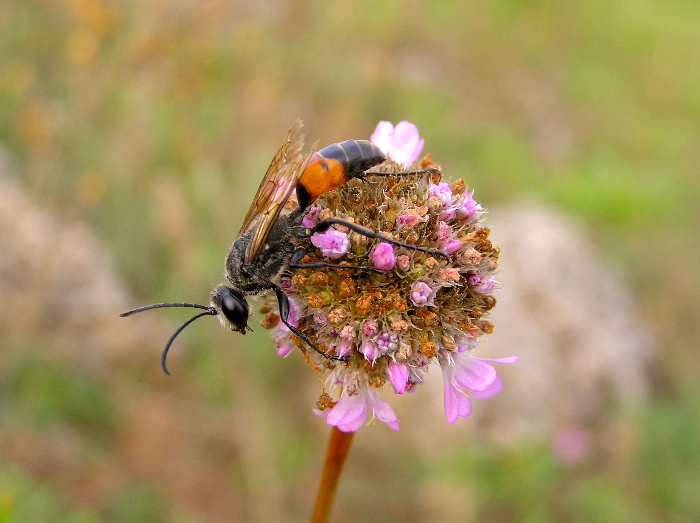 Les Rives, Hérault, FRANCE